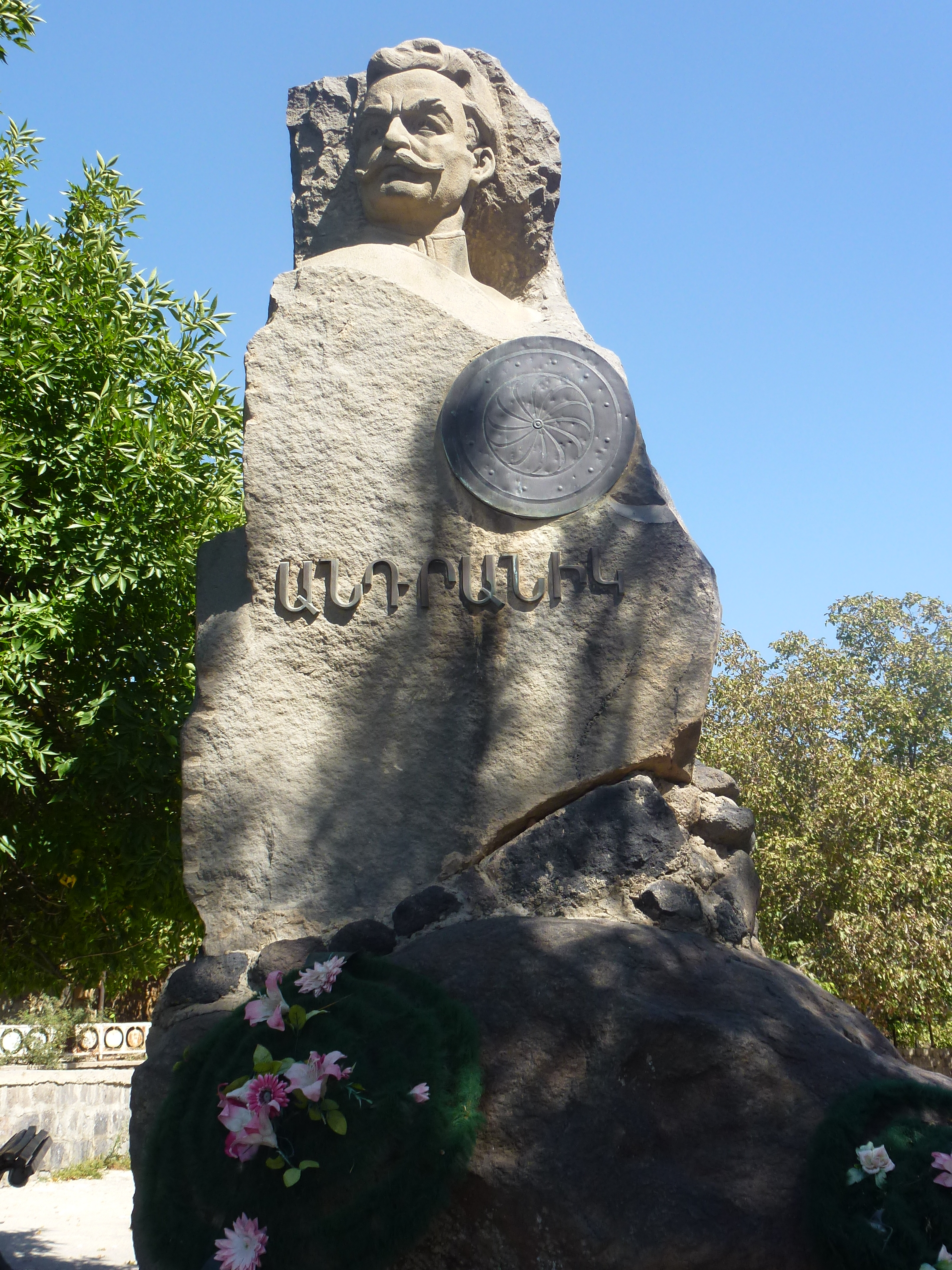 Ուջան, Արագածոտնի մարզ, ՀՈՒՇԱՐՁԱՆ` ԶՈՐԱՎԱՐ ԱՆԴՐԱՆԻԿԻ 1967 թ. գ. մ. քանդ.՝ Մ. Ավետիսյան 109/9